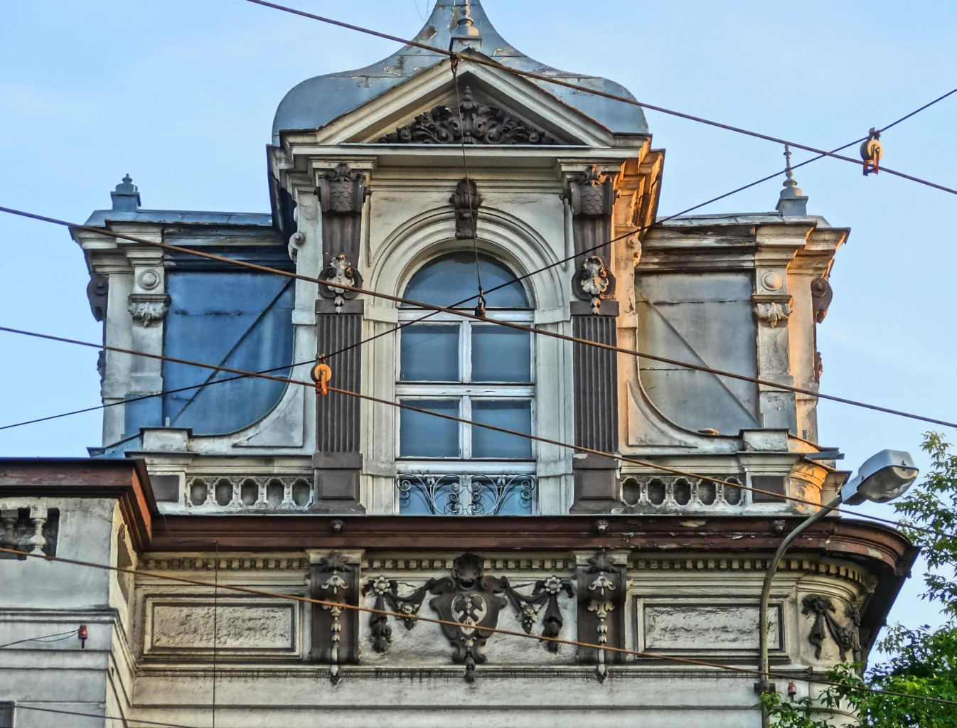 Willa fabrykanta, właściciela Fabryki Obrabiarek do Drewna Carla Blumwe - ul. Nakielska 53 w Bydgoszczy (1891)